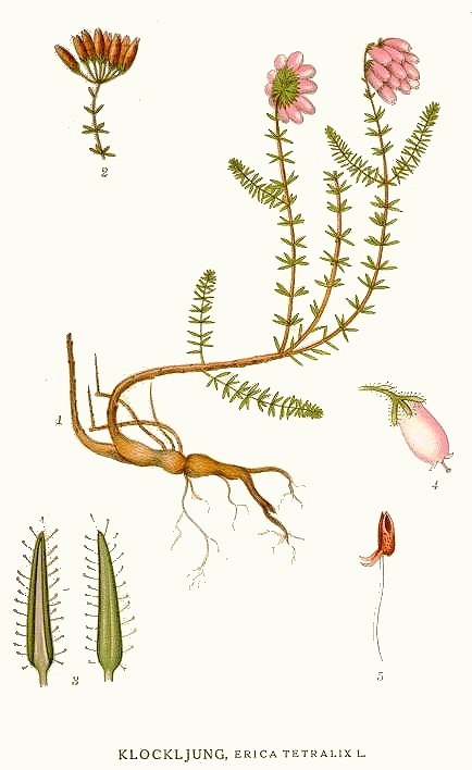 Original Description Klockljung, Erica tetralix L.